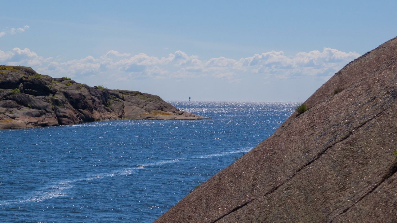 Hollenderbåen light seen above Garnholmen